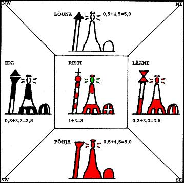 Kardinaalsüsteem